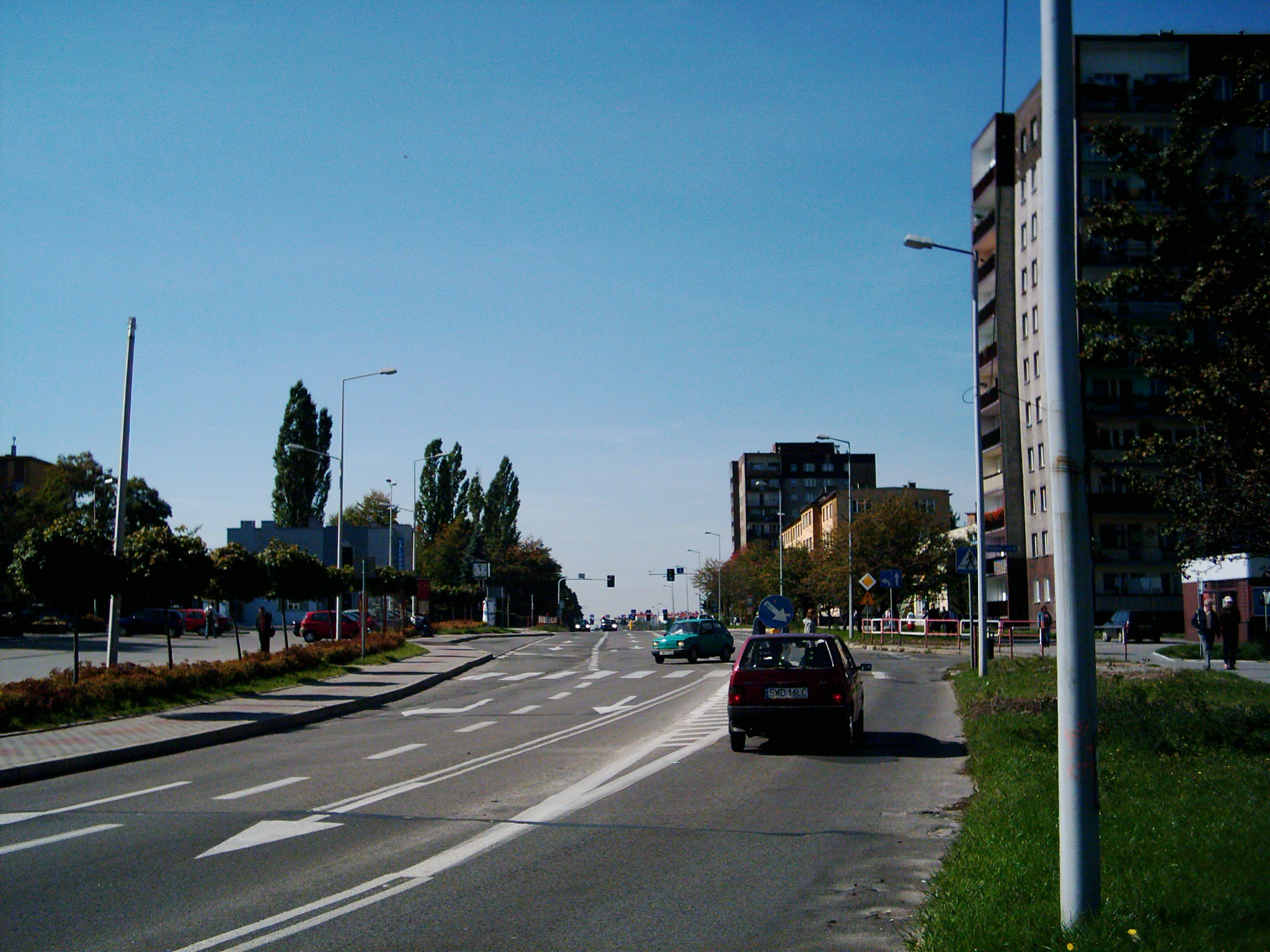 Wodzisław Śląski - ul. 26 Marca - Z prawej budynek Szpitala Miejskiego.